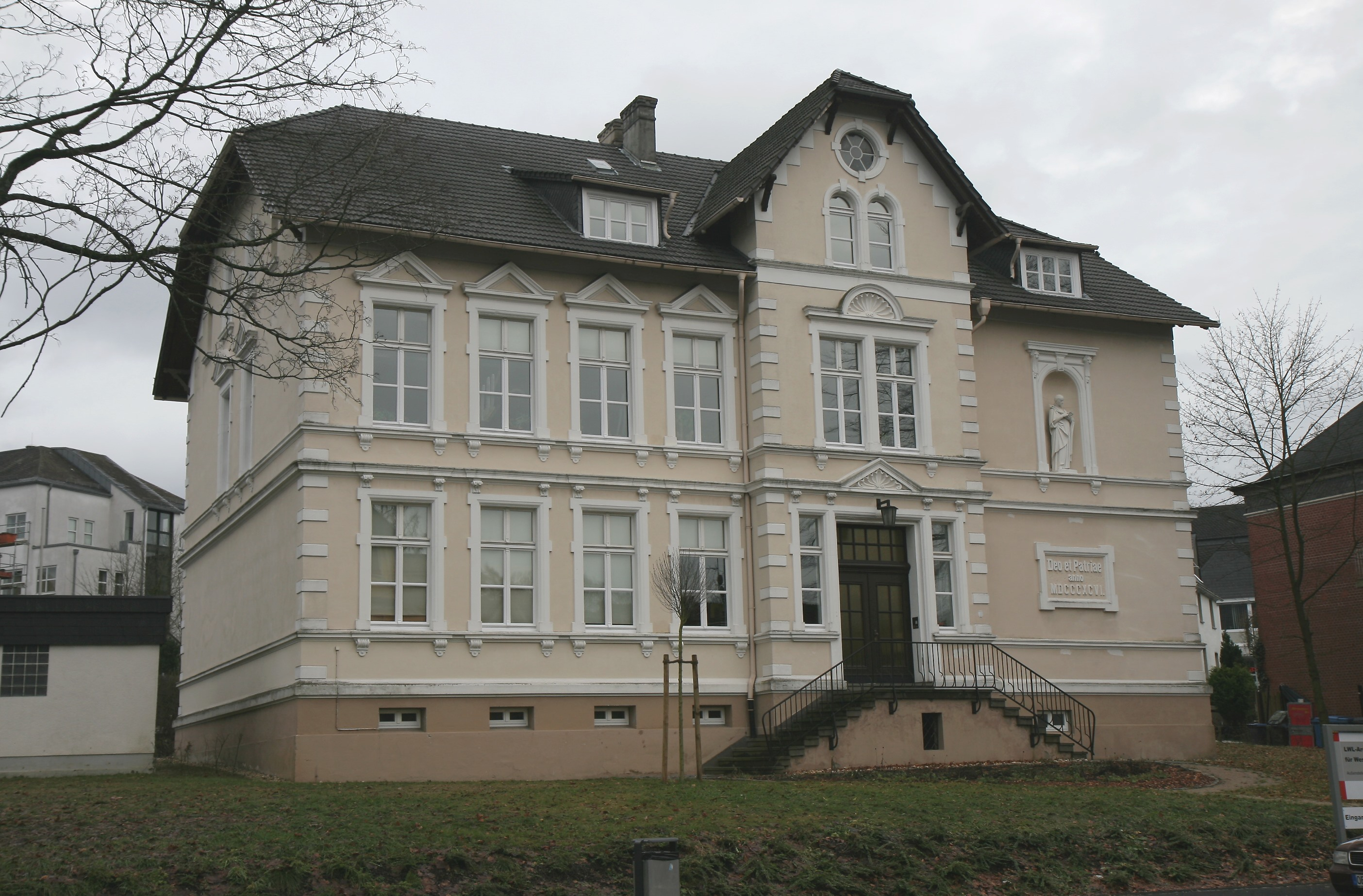 Ehemaliges Schulgebäude in Olpe, In der Wüste 4. Denkmalschutz seit 23. August 1983. Heutige Nutzung: Außenstelle Olpe der LWL-Archäologie für Westfalen (früher Amt für Bodendenkmalpflege).